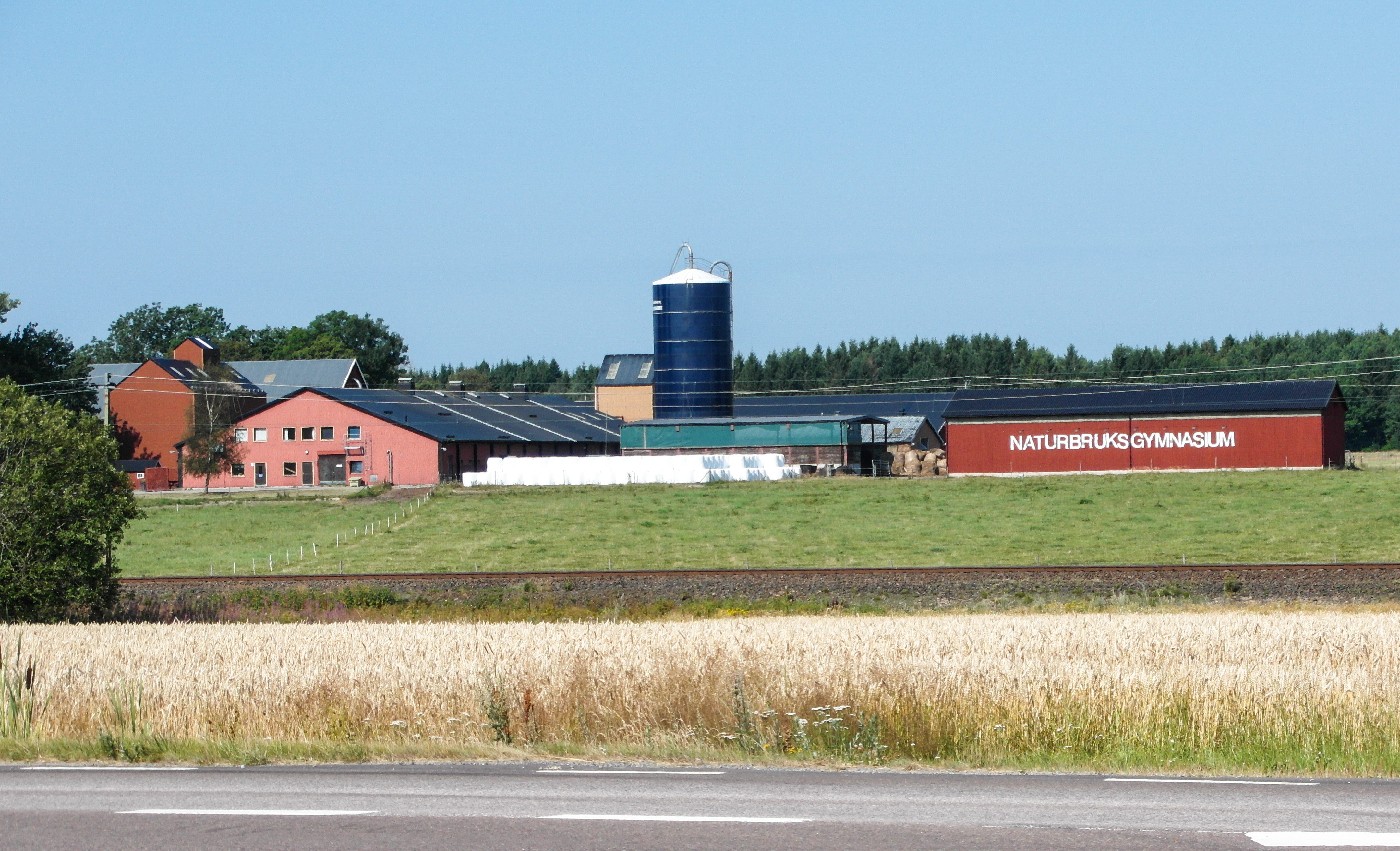 Nuntorp naturbruksgymnasium juli 2014, Brålanda, Vänersborgs kommun